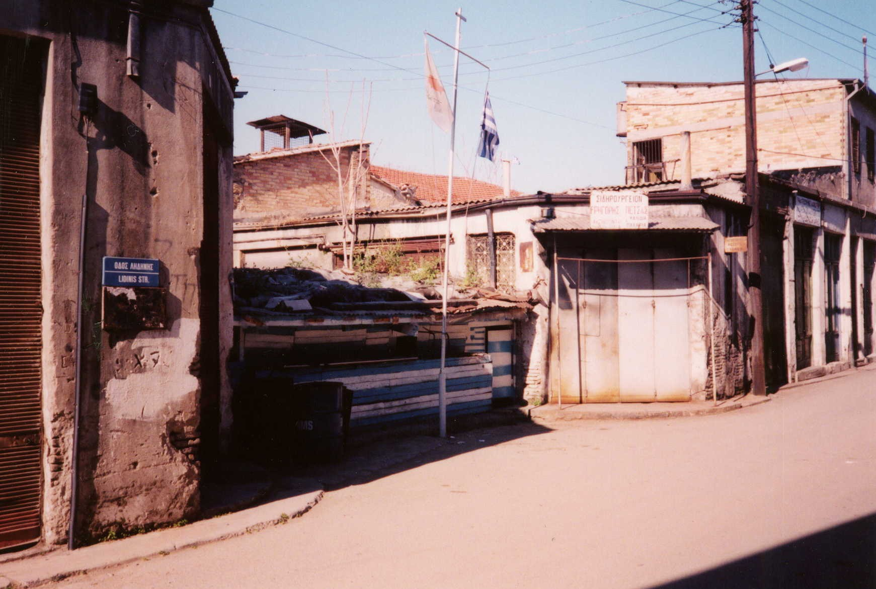 Vista de barricada de separación de Chipre con la autodenominada TRNC (Turkish Republic Nothern Cyprus). Centro de Nicosia. Toma realizada desde el sector greco - chipriota. Fecha de la Imagen: May 1998.